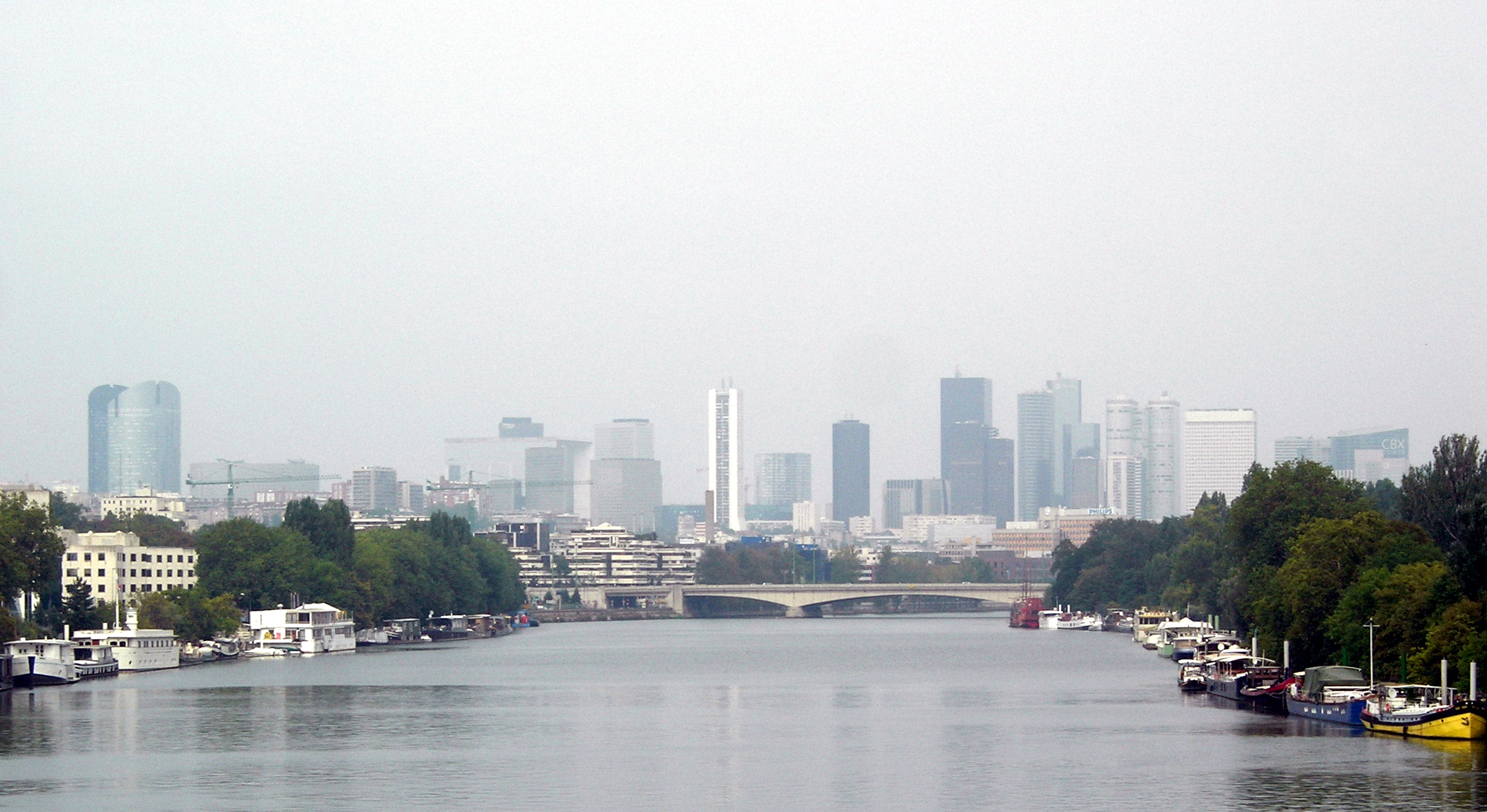 La Seine, le pont de Suresnes, le bois de Boulogne (à droite) et à l'arrière plan les tours du quartier d'affaires de la Défense (prise de vue depuis la passerelle de l'Avre)